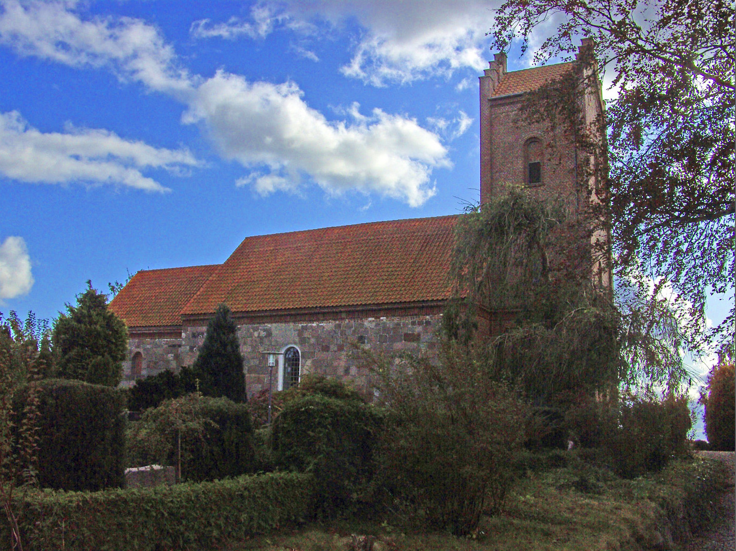 fra nord